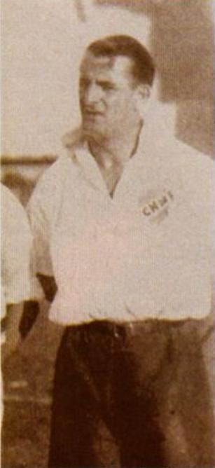 José Nasazzi en filas de Nacional.